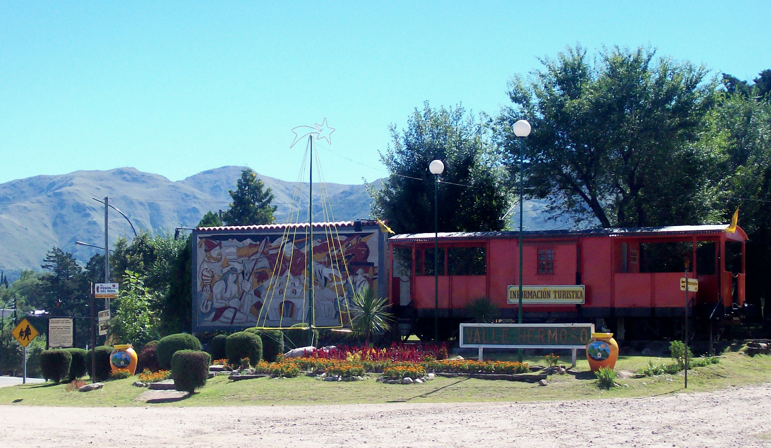 Cartel de Bienvenida y centro de información turística al sur de Valle Hermoso, sobre la Ruta 38, en la provincia de Córdoba, Argentina